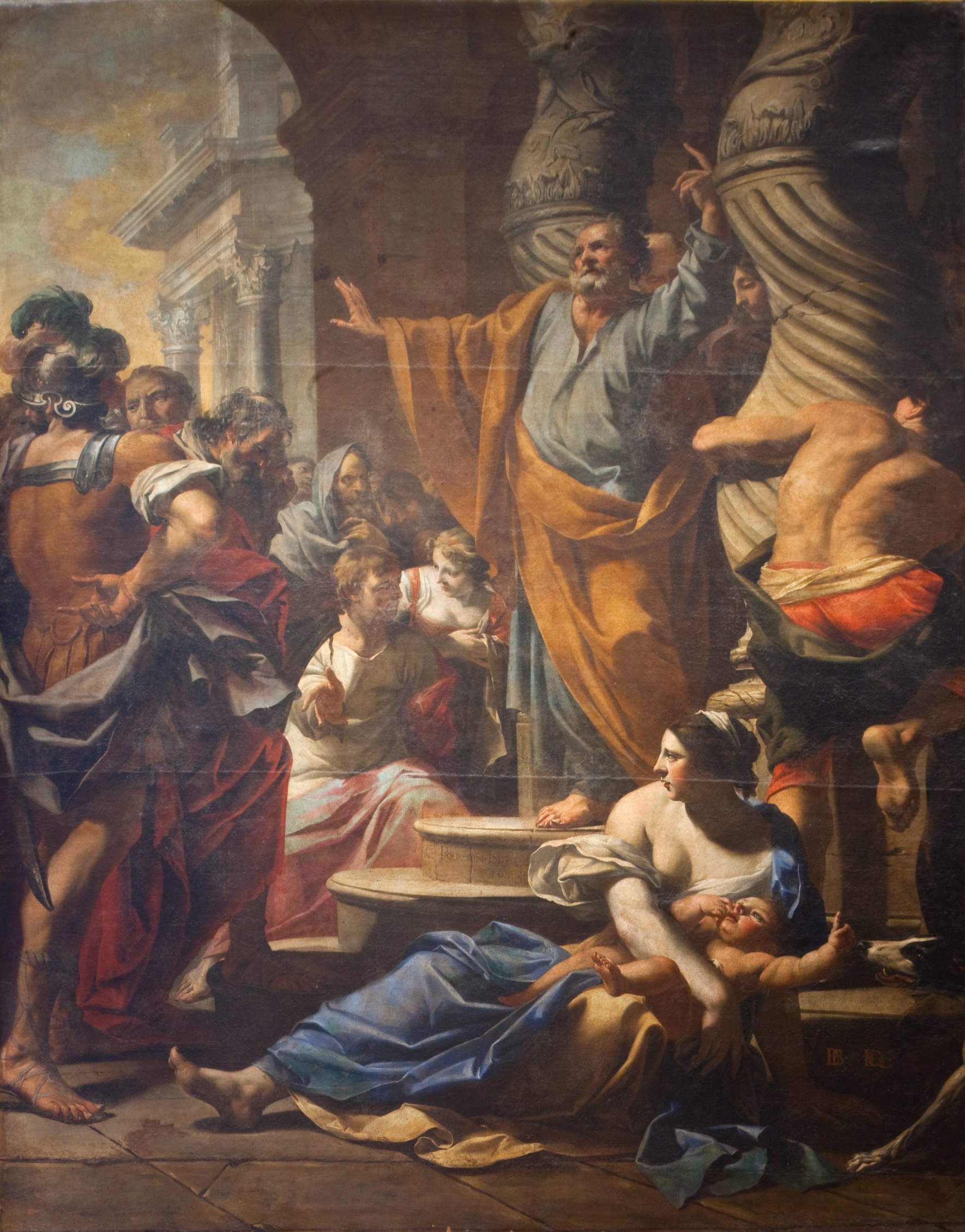 May de 1642 par Charles Poërson